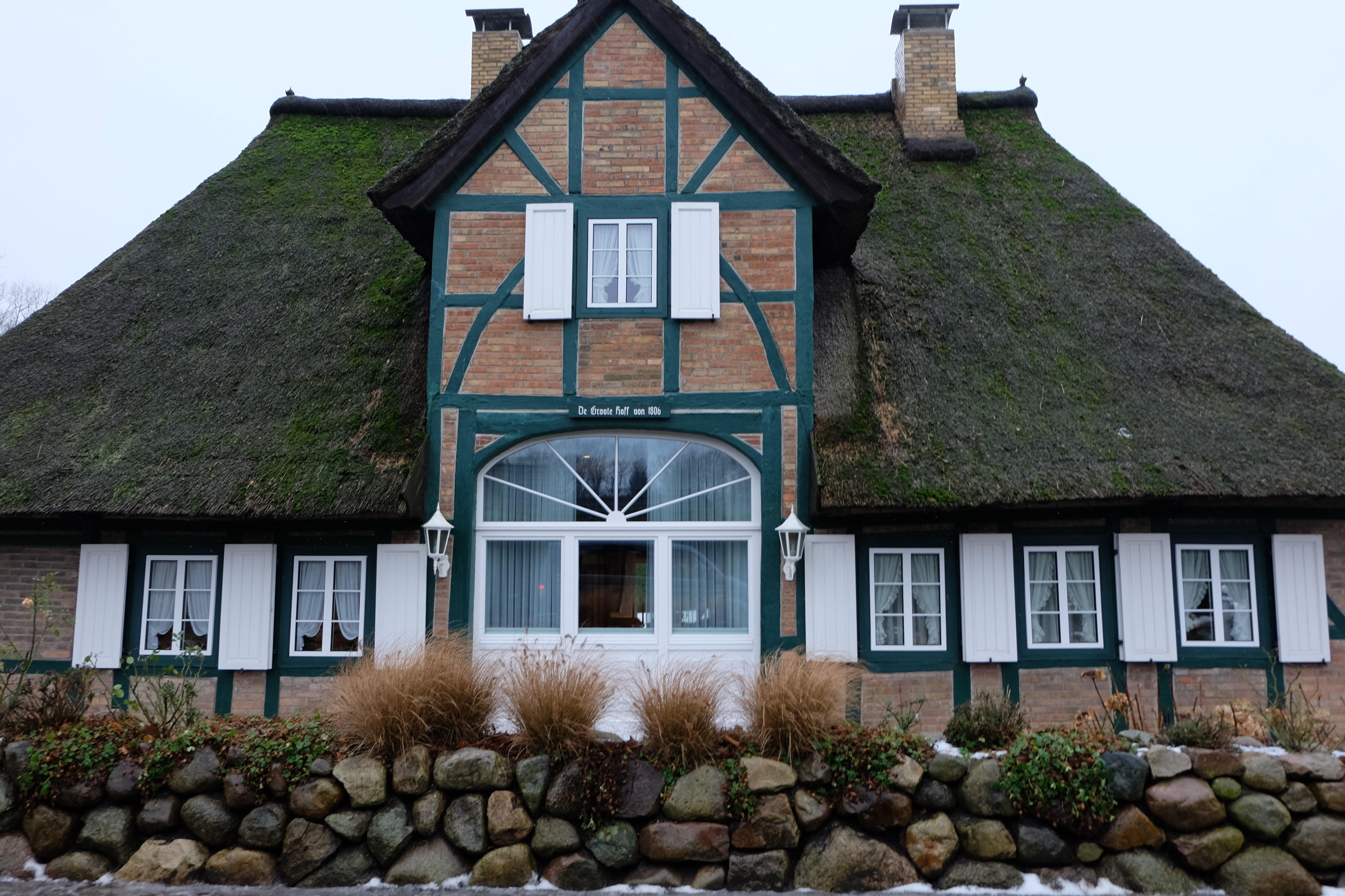 De Groote Huss, erbaut 1806 in Bosau, Amtssitz des Bürgermeisters von 1806 bis 1844